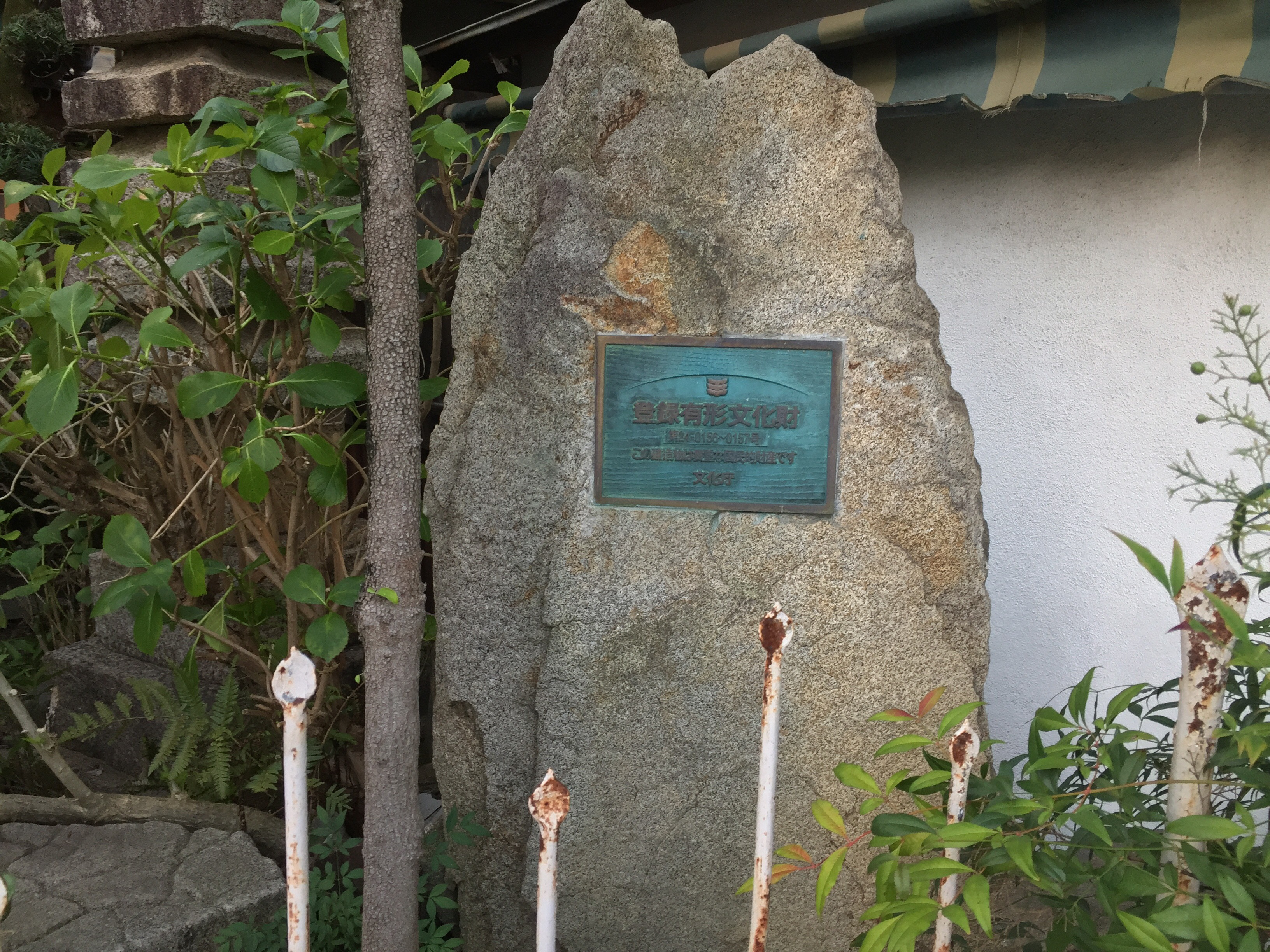 三重県伊賀市の銭湯「一之湯」。登録有形文化財に登録されていることを示すプレート。